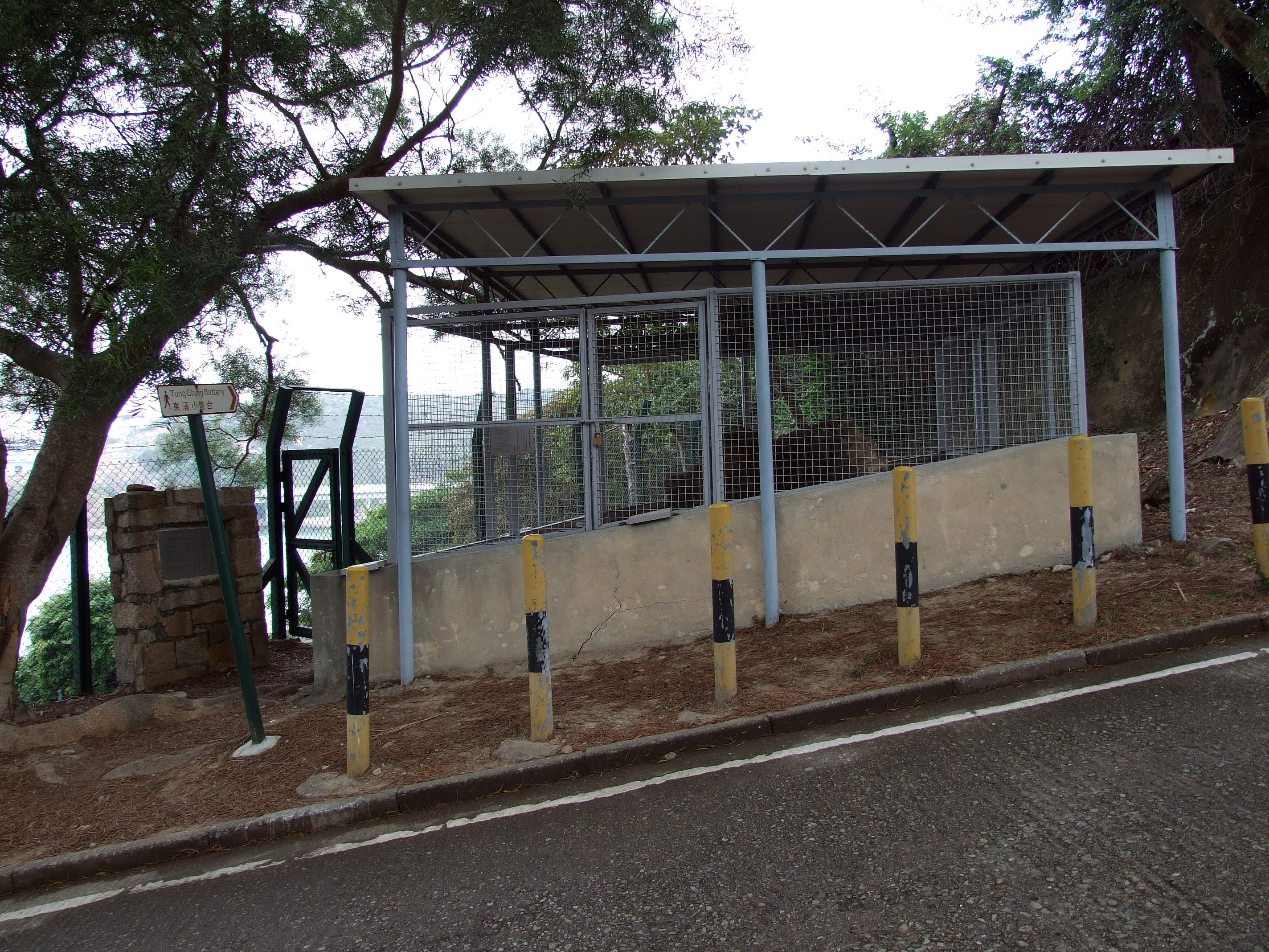 中文（香港）: 赤臘角虎地灣灰窰(遷移東涌)